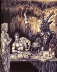 Mikelats